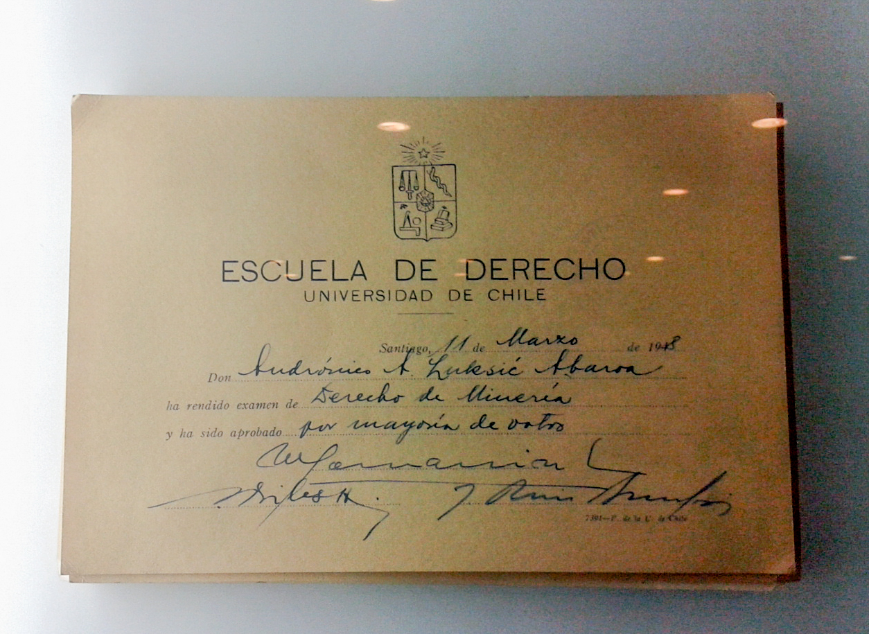 Exhibido en la Facultad de Economía y Negocios de la Universidad de Chile.